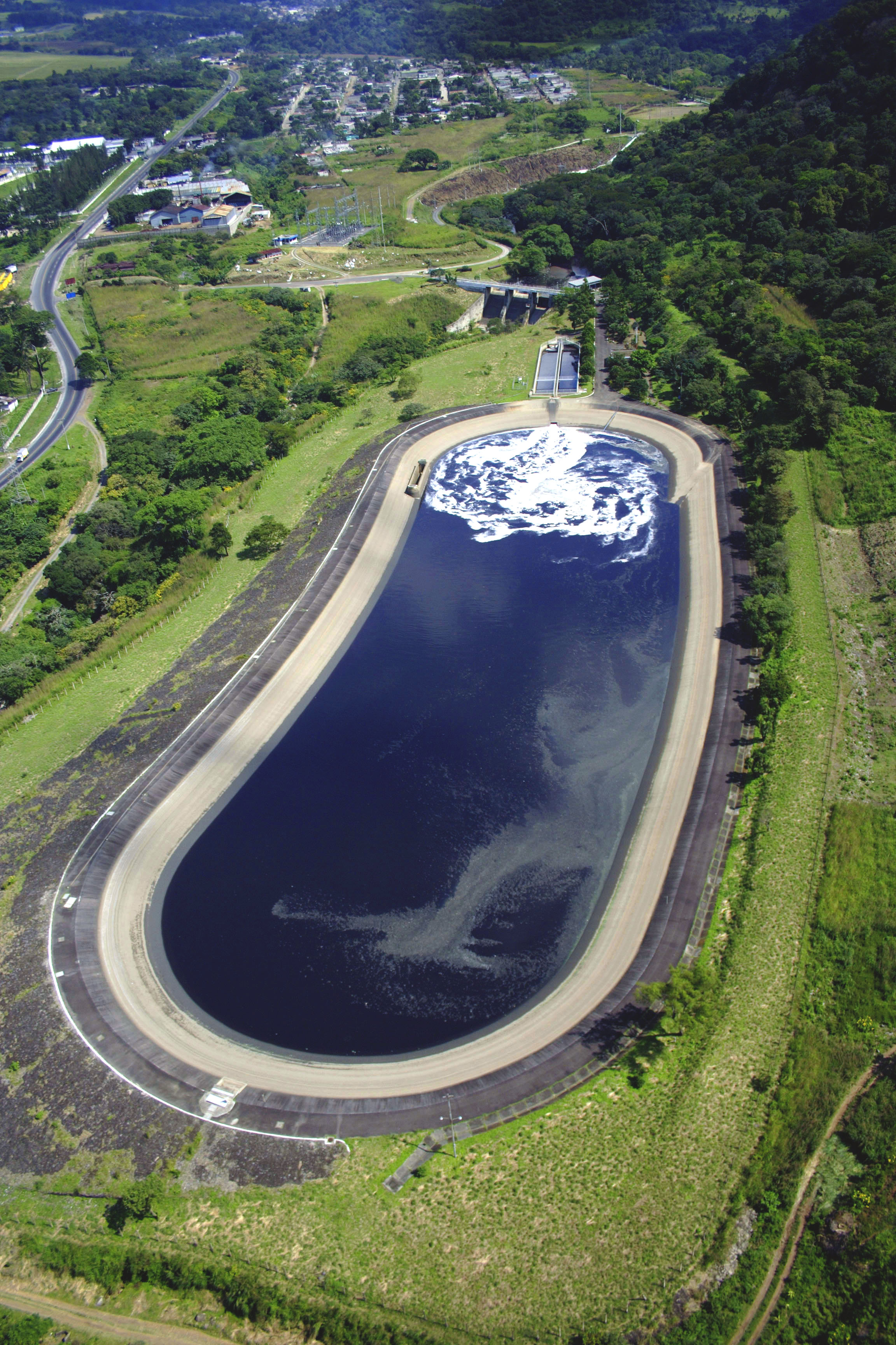 Vista Aérea del embalse